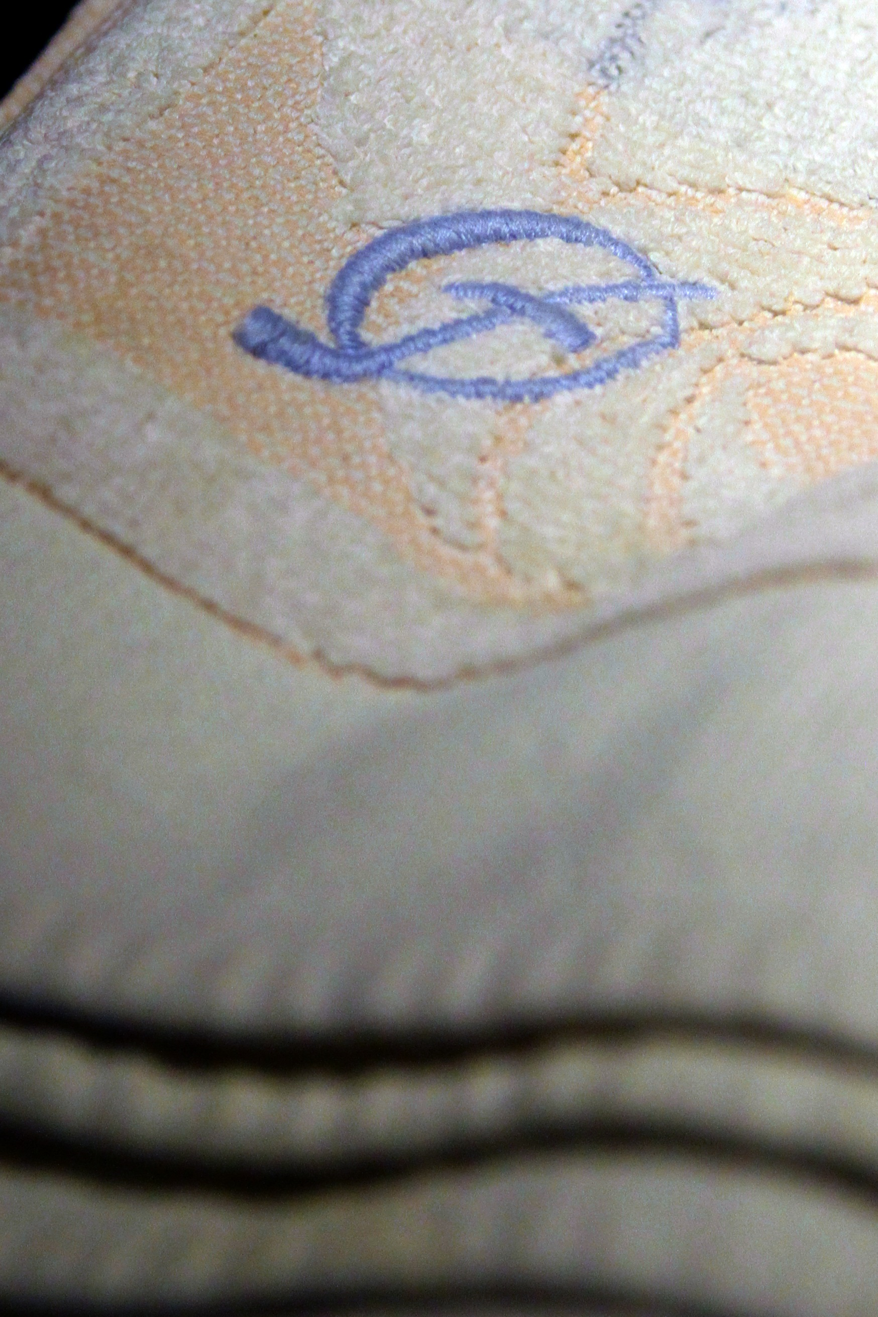 Håndkle med Bjørn Østrings monogram. Da Amalie Laksov kom tilbake til leiligheten sin i Dunkersgate 4 i Oslo etter krigen var den overtatt av familien Østring. De hadde brodert monogrammet sitt på Laksovs håndkle. På utstilling hos Senter for studier av Holocaust og livssynsminoriteter.